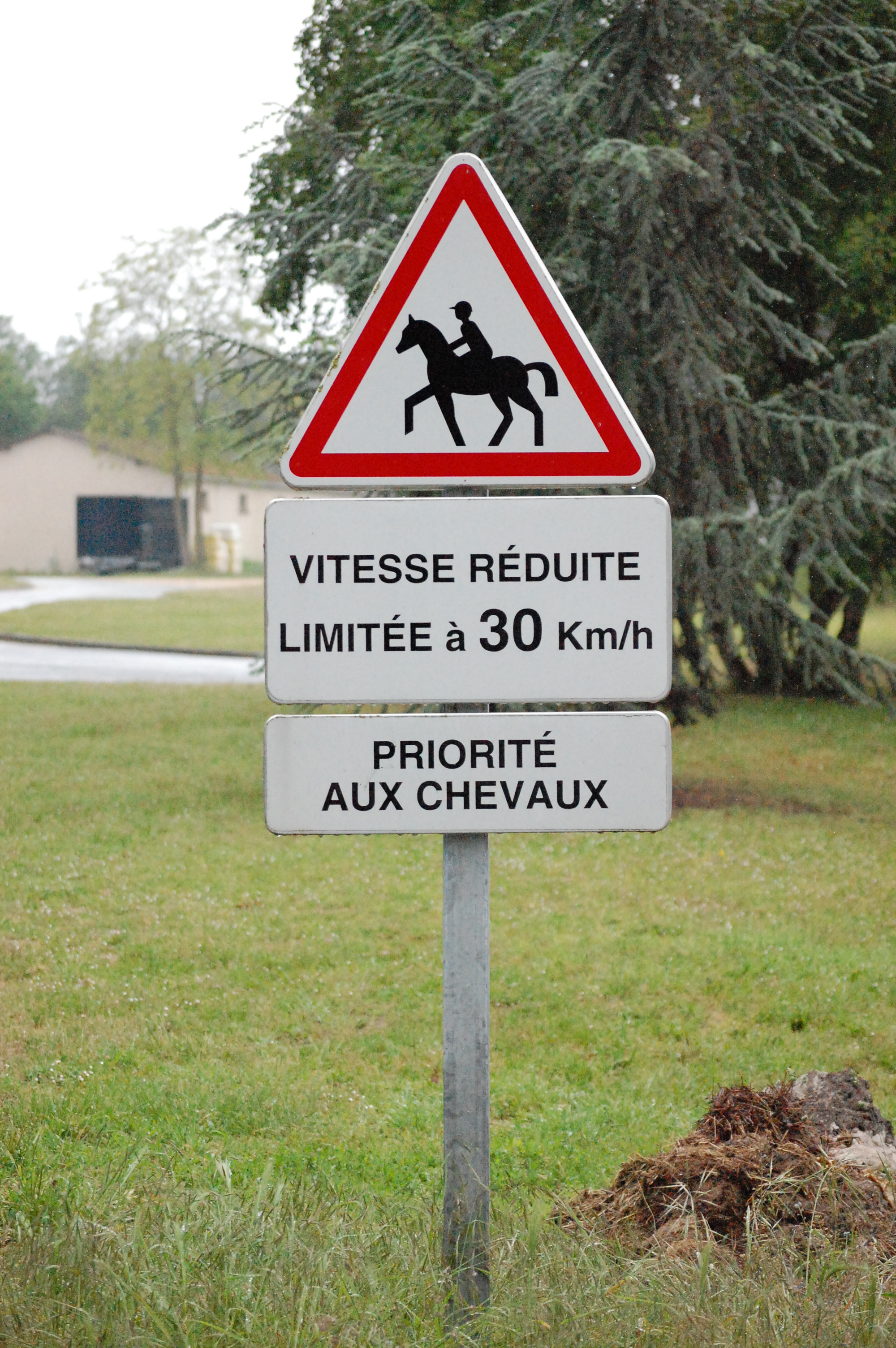 Cadre noir, signalisation routière attention aux chevaux